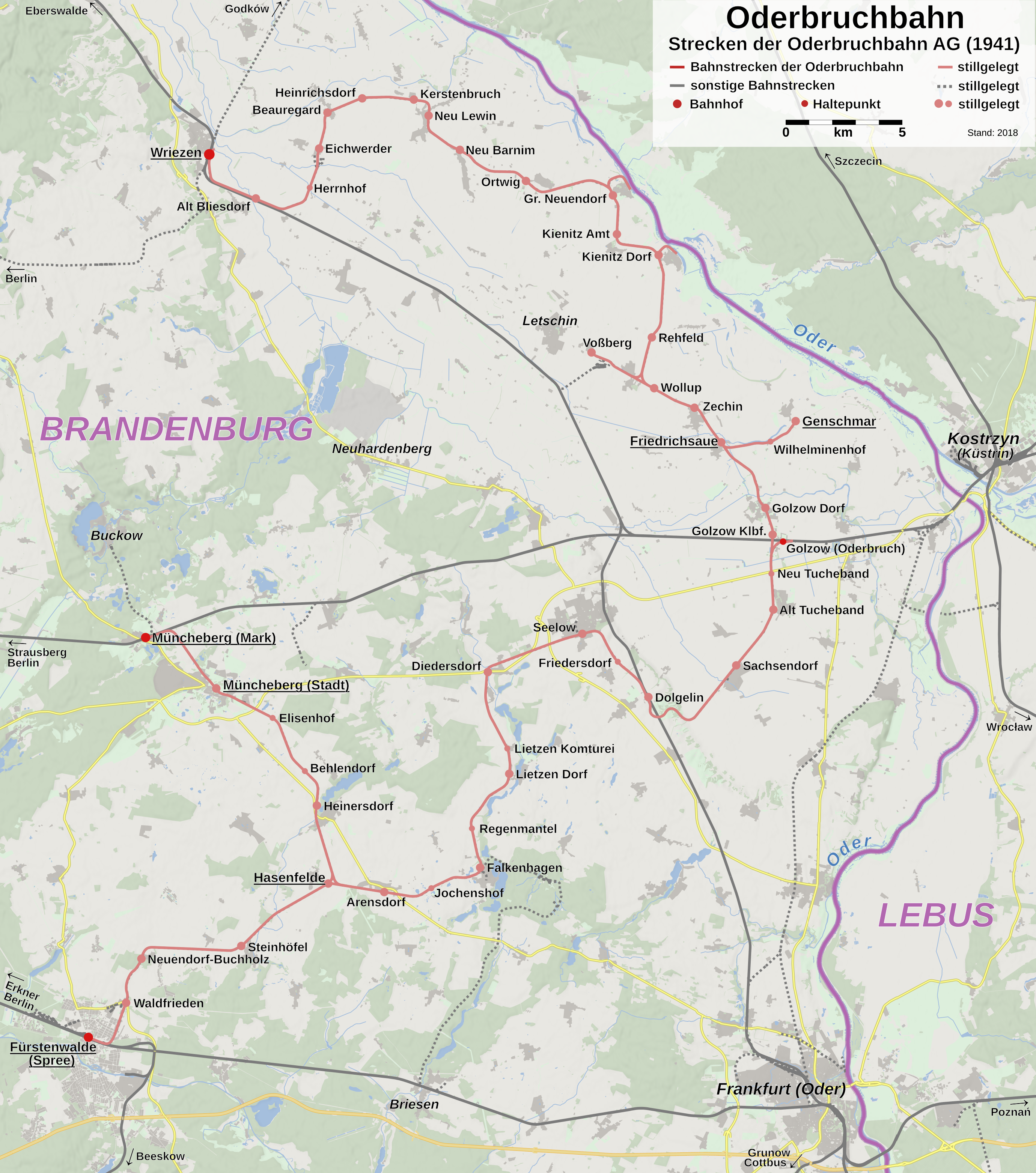 Karte der Bahnstrecken, die ab 1941 von der Oderbruchbahn AG betrieben wurden. Die Endbahnhöfe der einzelnen Bahnstrecken sind unterstrichen. Die Karte gibt den aktuellen (2018) Zustand der Strecken wieder. Mit Kartenmaterial von OpenStreetMap. This map may be incomplete, and may contain errors. Don't rely solely on it for navigation.